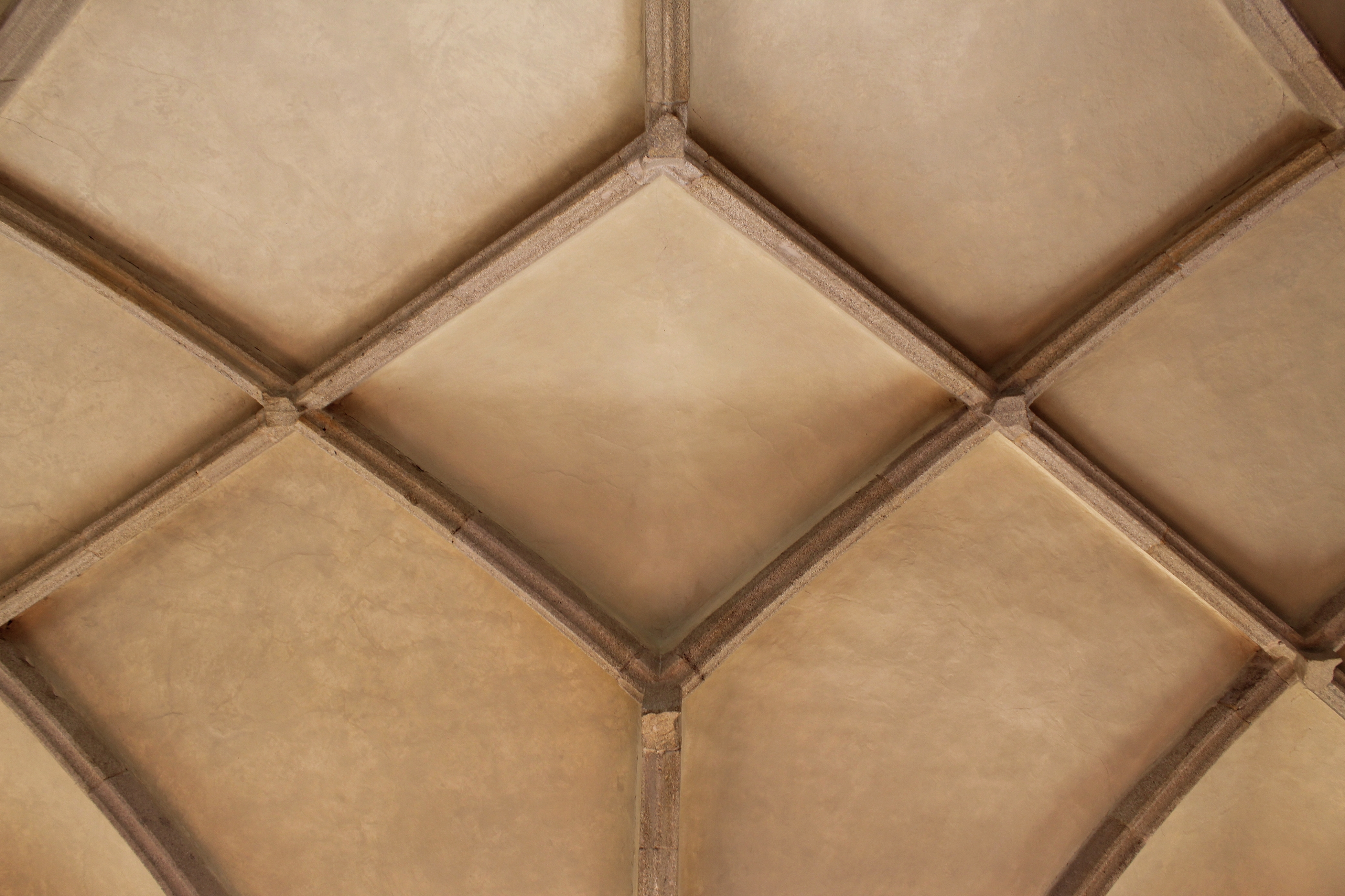 Jindřichův Hradec